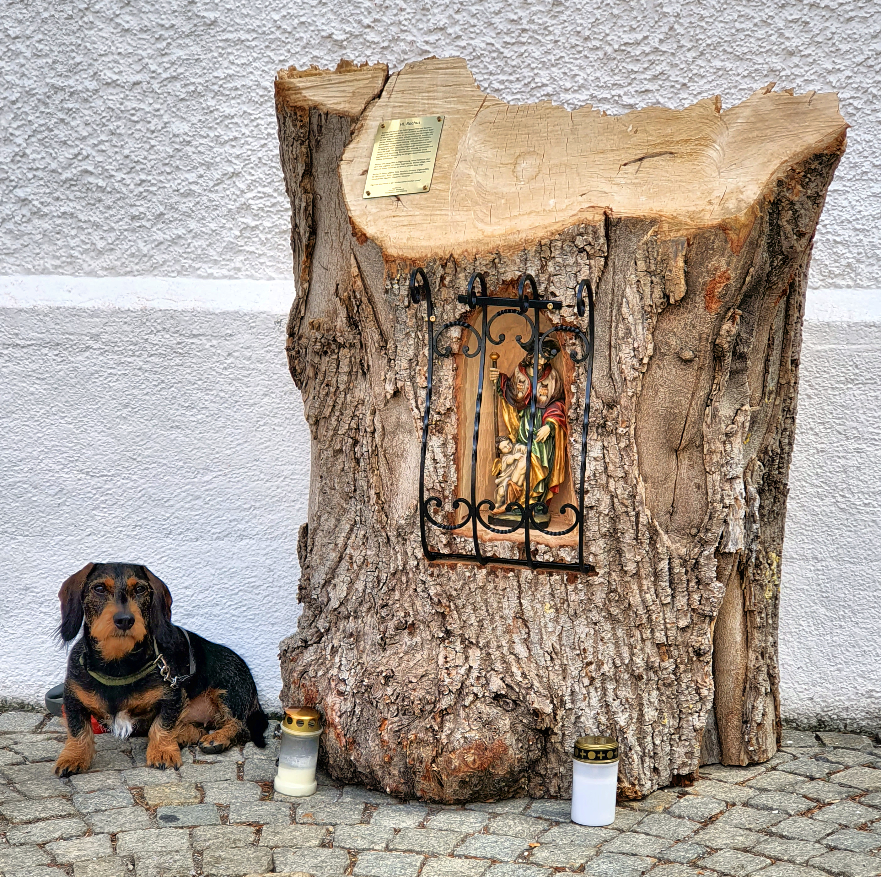 St. Rochus Gedenkaltar an der Gröbenzeller katholischen Kirche anläßlich der Corona-Pandemie im Frühjahr 2020, St. Rochus wird angerufen bei Seuchen, Pest, Cholera und ist Patron für die Kranken, Ärzte, Krankenhäuser und Gefangene